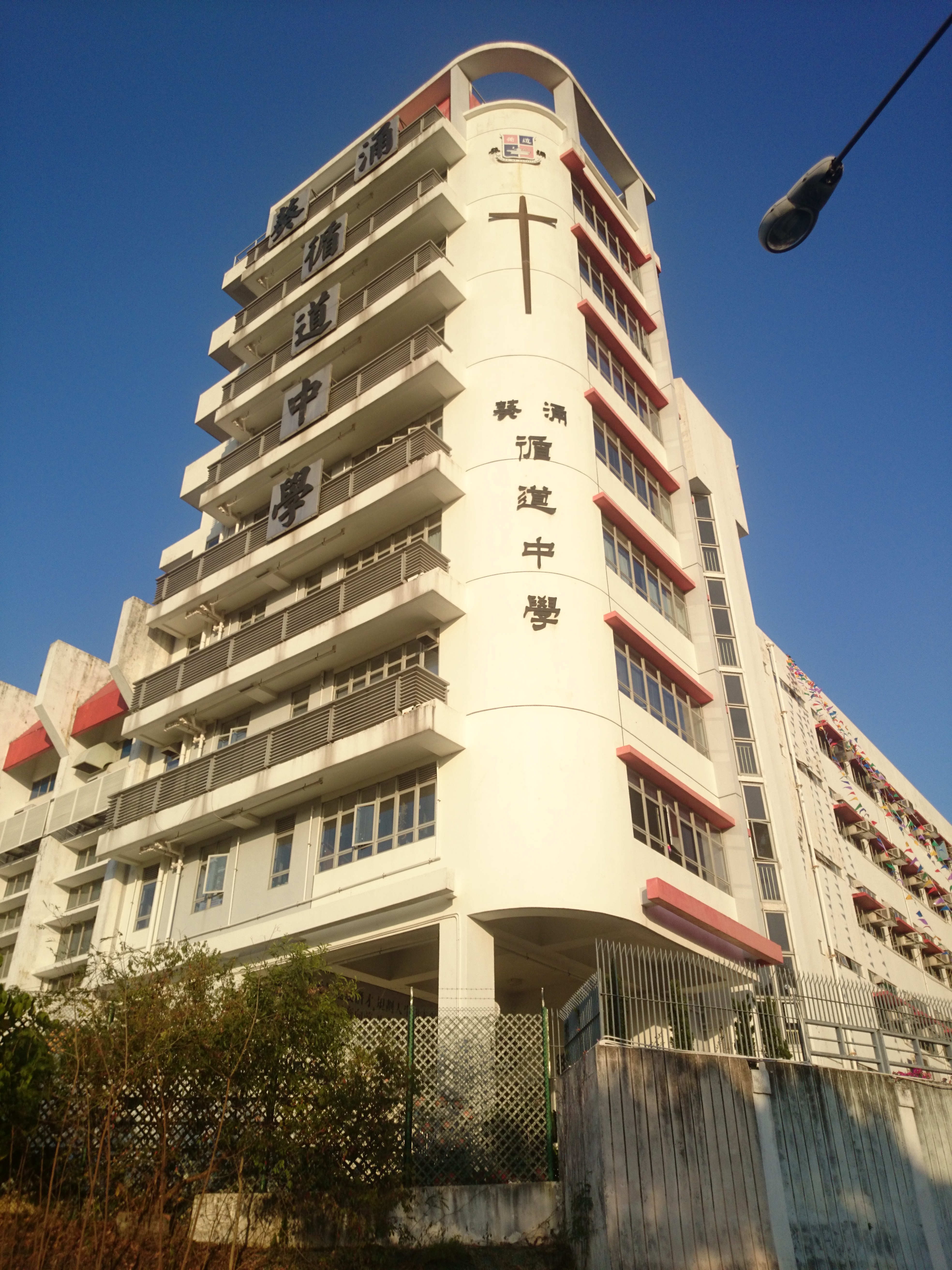 粵語: 呢個係黃昏嗰陣嘅葵涌循道中學。夕陽嘅光照到葵循嘅外牆黃唒。